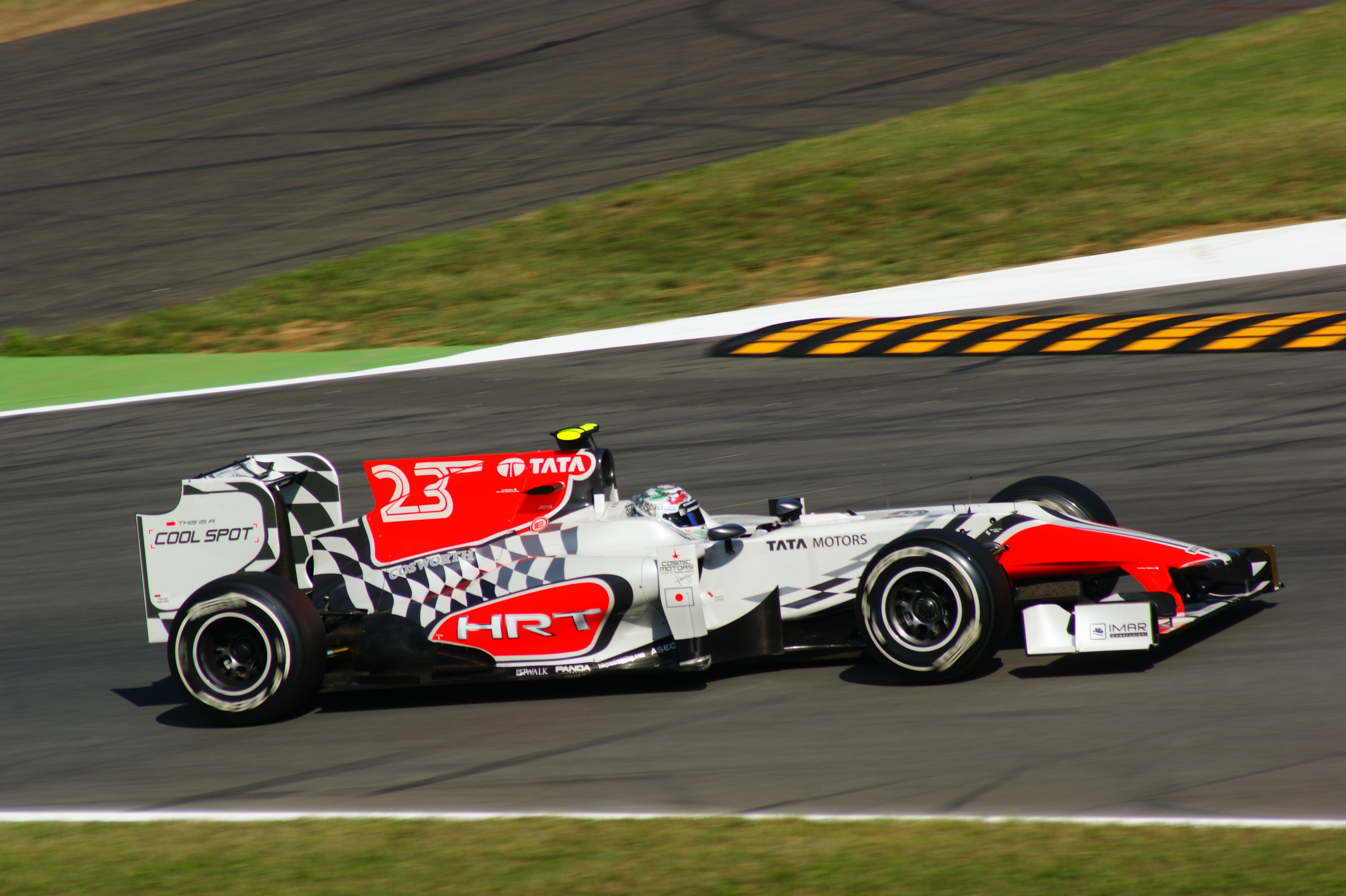 Vitantonio Liuzzi alla prima variante Monza 2011